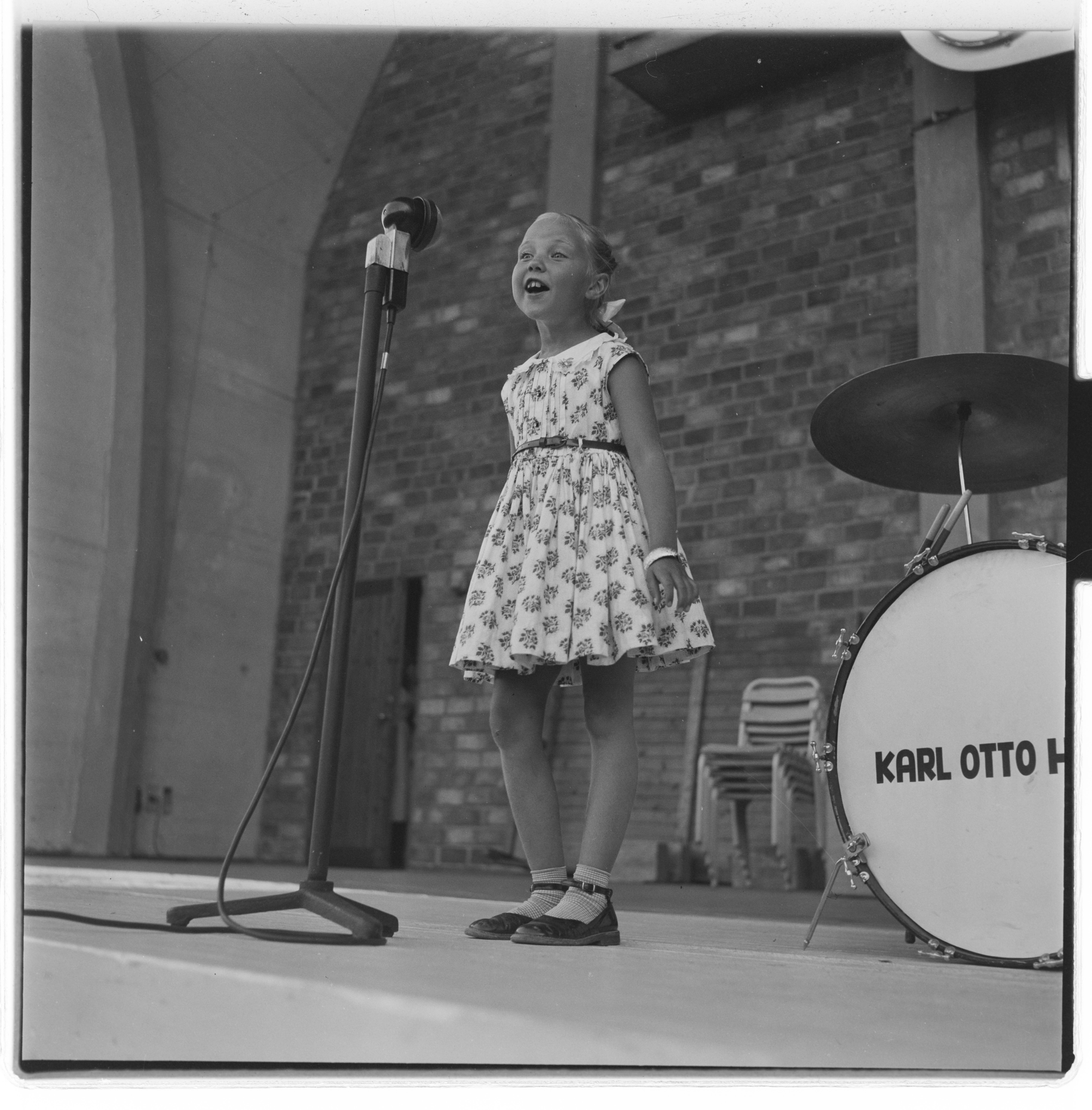 Bildet er hentet fra Arkivverket. Delta Rythm Boys på Jordal Amfi Arkivinstitusjon : Riksarkivet Arkivnavn : Billedbladet NÅ Sted : Norge, Oslo, Oslo, Jordal Amfi Emneord: konsert, musikere Avbildet: Kausland, Grete